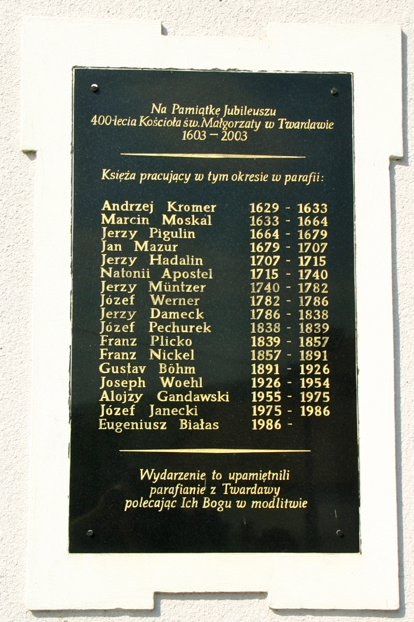 Twardawa – wies w Polsce położony w województwie opolskim, w powiecie prudnickim, w gminie Głogówek.